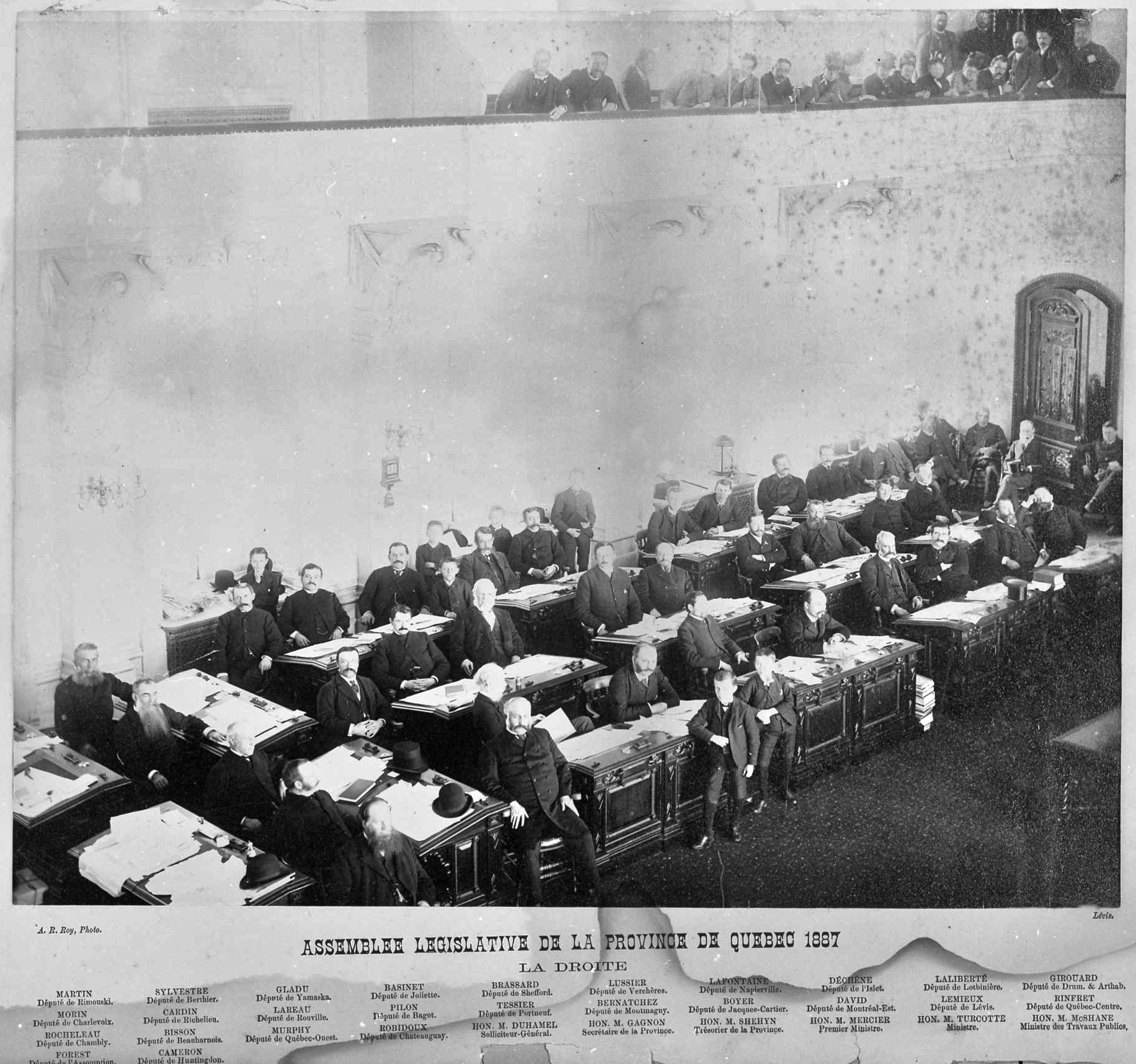 Assemblée législative de la province de Québec 1887. La photo montre les députés siégeant du côté du parti libéral d'Honoré Mercier. (En sous-titre, « la droite » signifie les députés dont les sièges se trouvent à la droite du président de l'Assemblée, côté de la salle qui, par tradition, est attribué aux députés qui appuient le gouvernement en place. Il ne s'agit pas d'une référence au positionnement idéologique.)